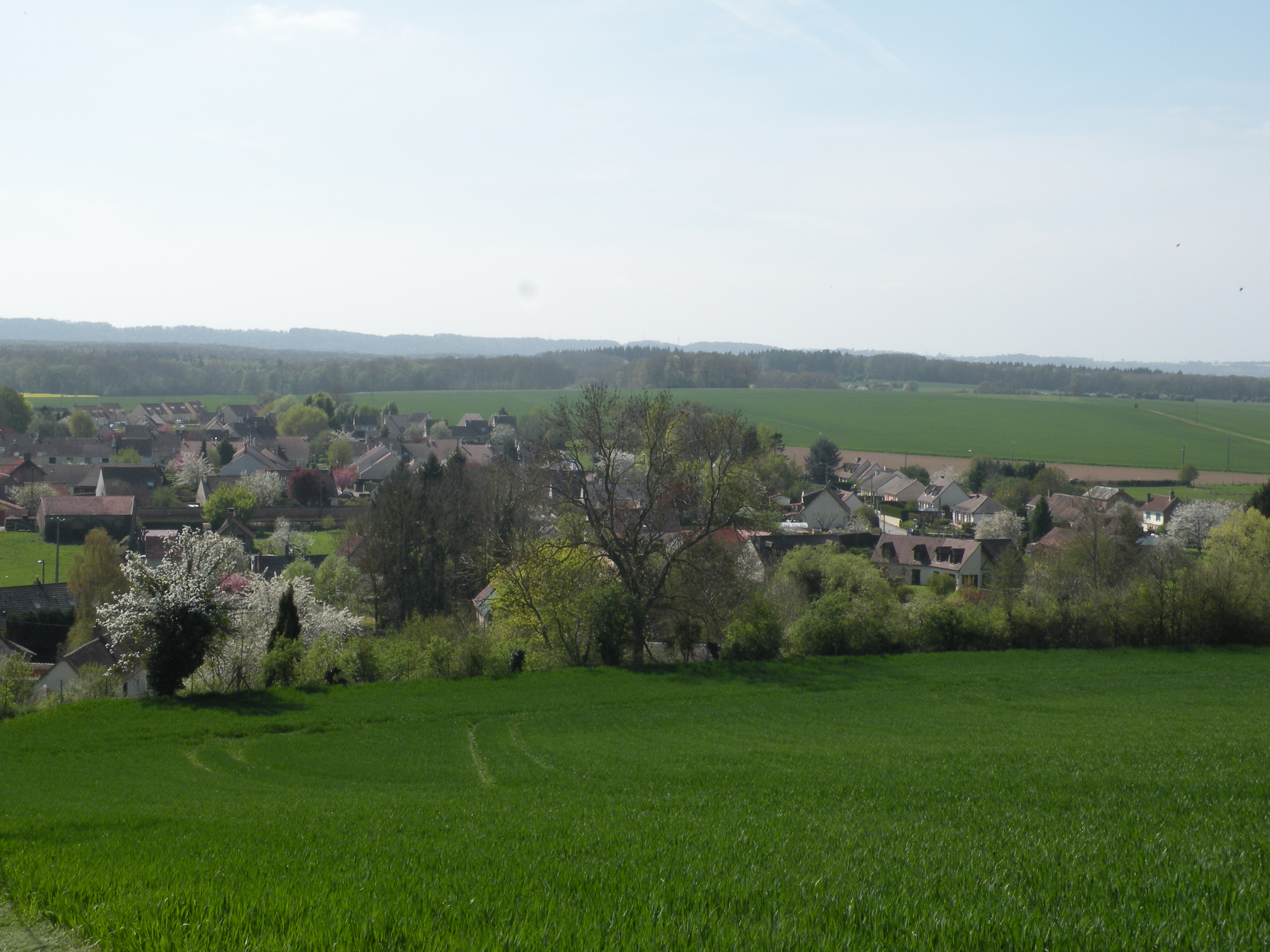 Frocourt